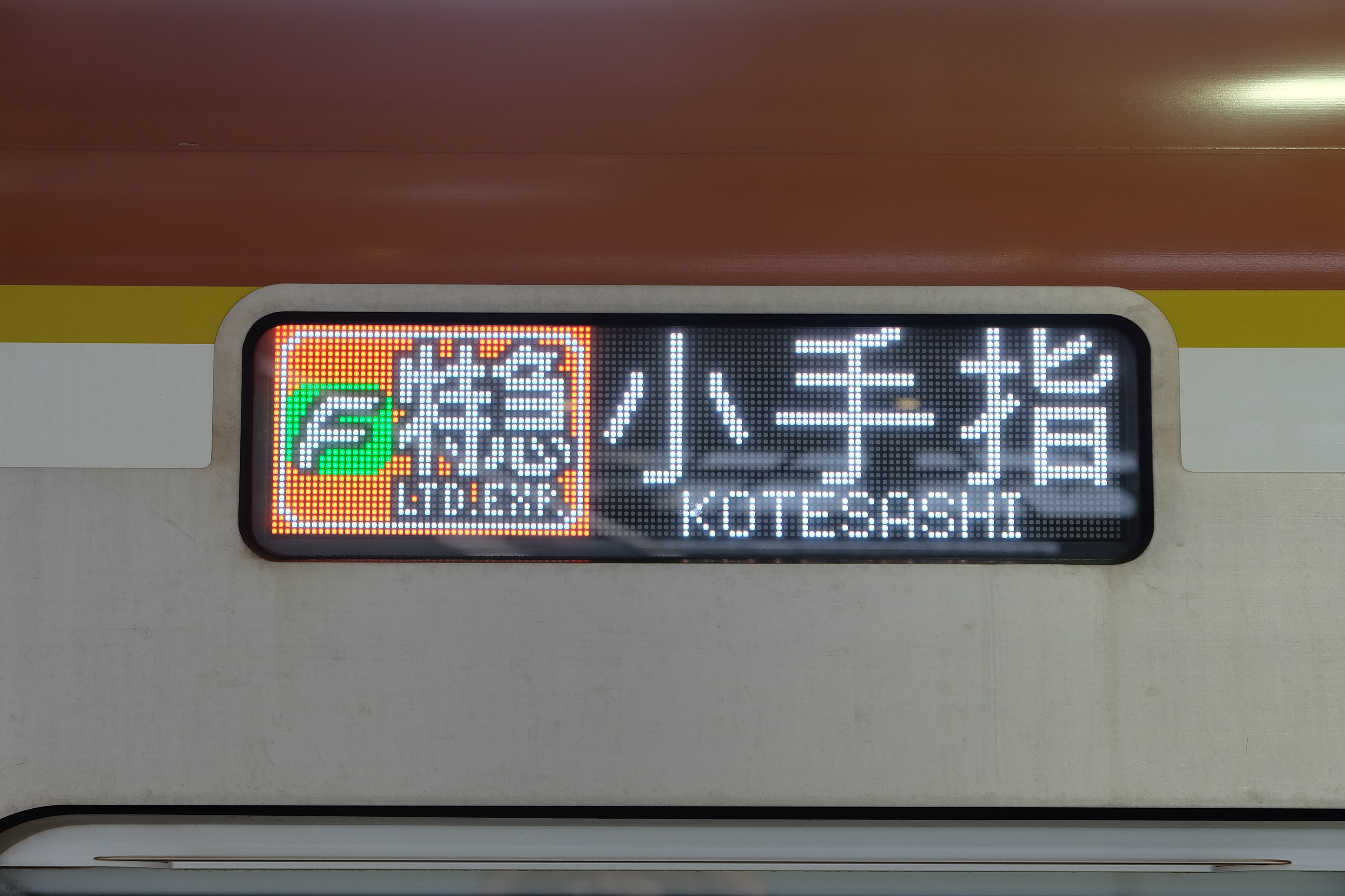 東京地下鉄10000系電車10705号車の「Fライナー」表示（菊名駅にて撮影）